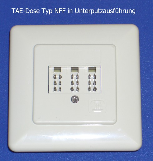 TAE-Dose Typ NF/F in Unterputzausführung